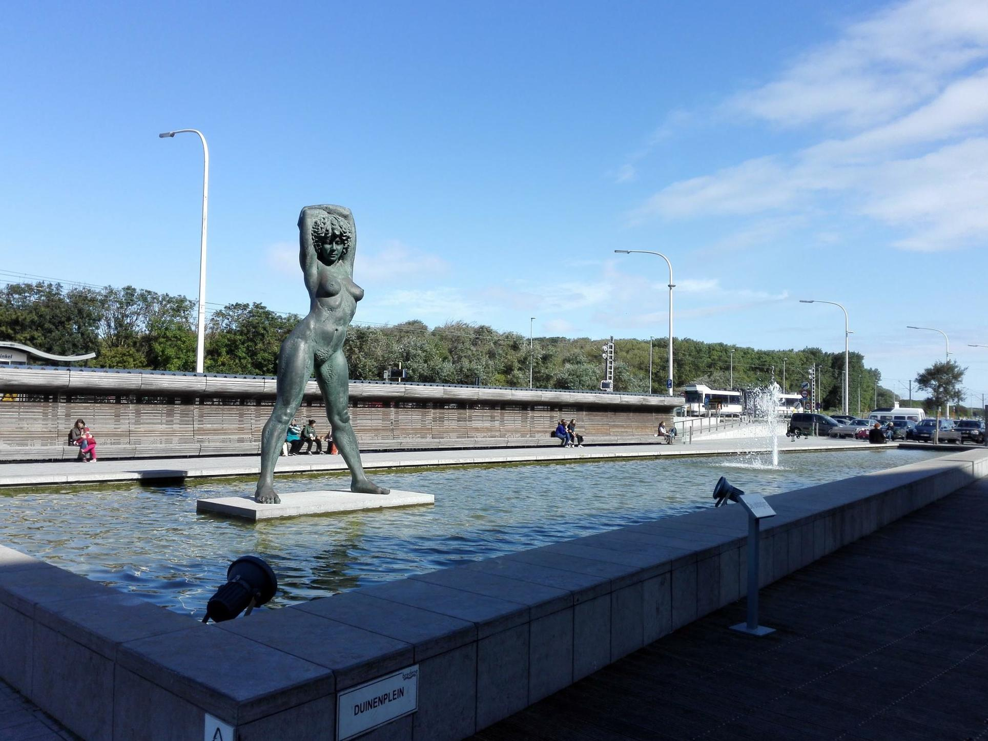 null